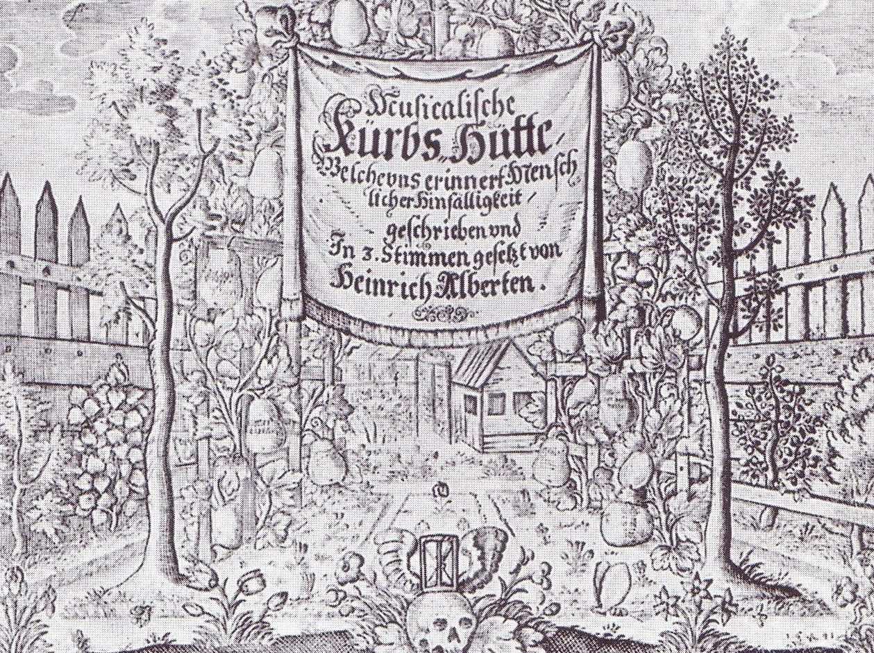 Allegoric drawing of the Kürbishütte in Königsberg